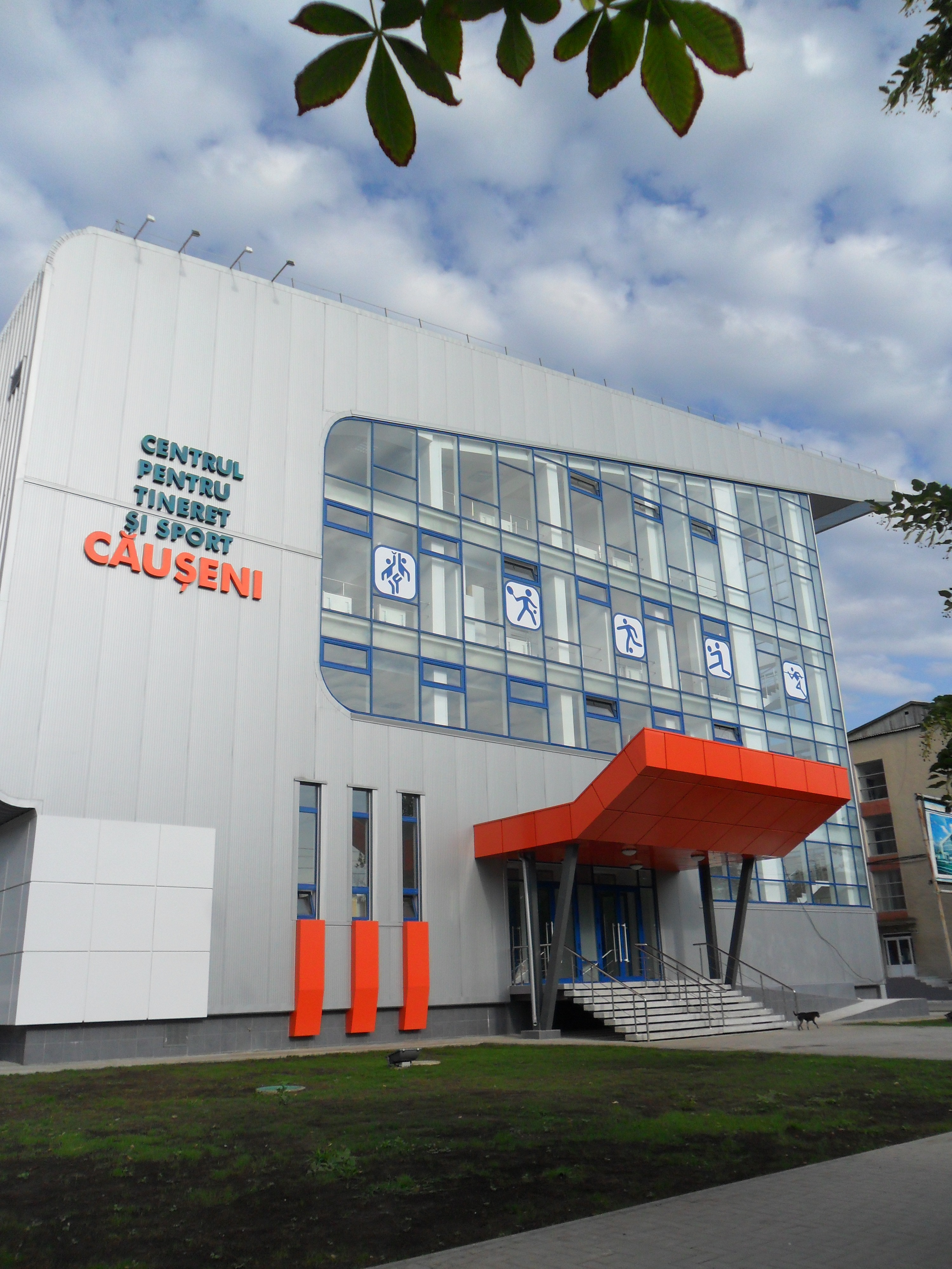 Centrul pentru tineret și sport, construit în 2013